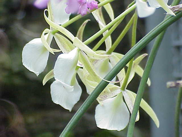 Species: Brassavola nodosa Family: Orchidaceae Image No. 1